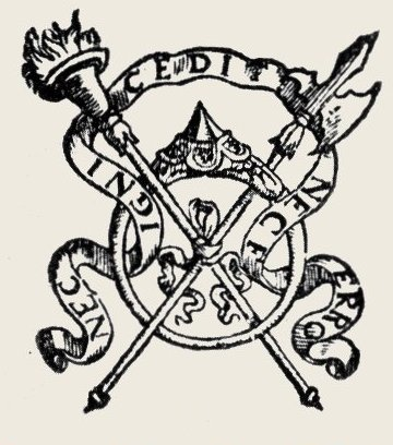 Tiskařský signet Jana Melantricha z Aventina